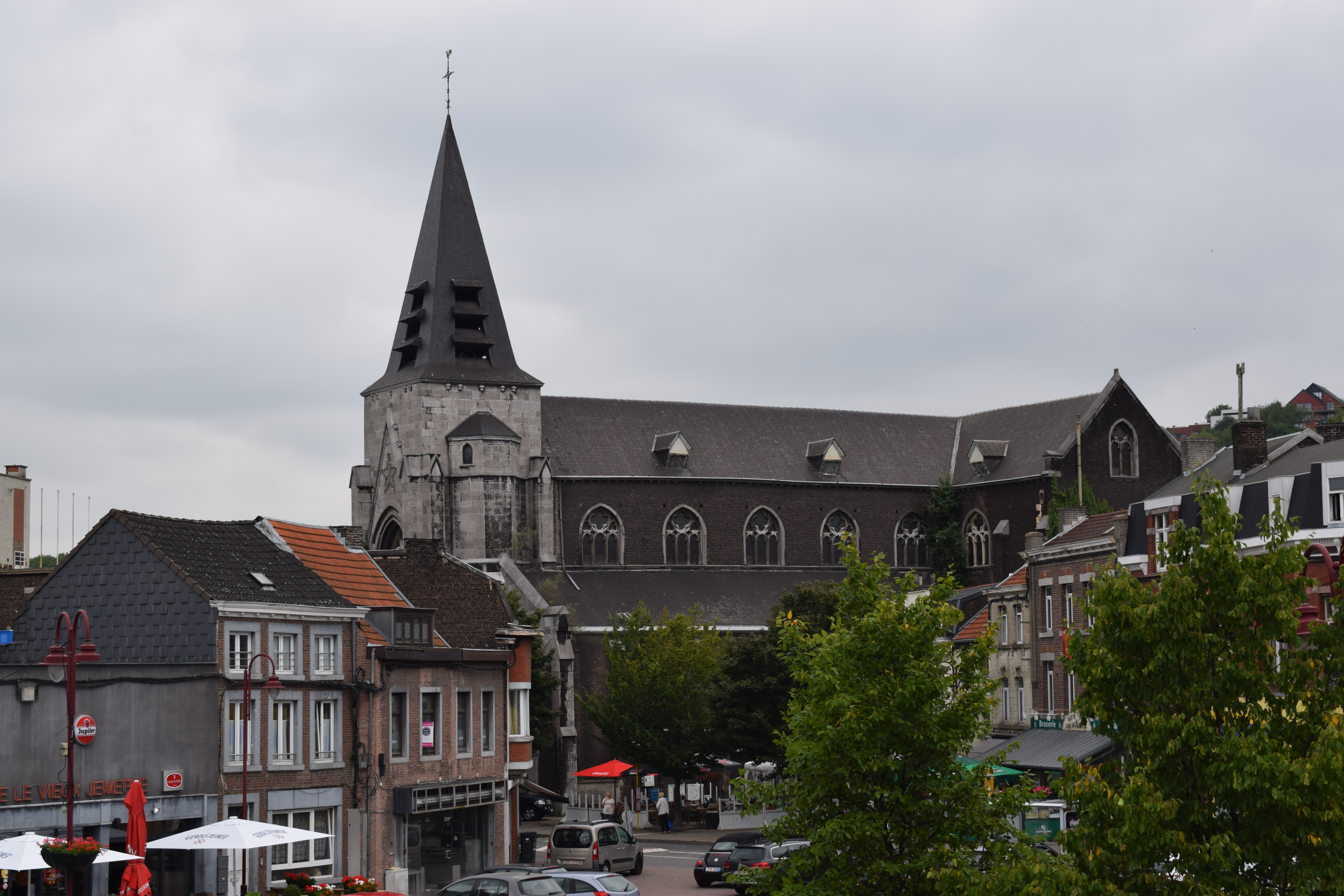 Vue de Jemeppe-sur-Meuse, dans la commune de Seraing (province de Liège, en Belgique).